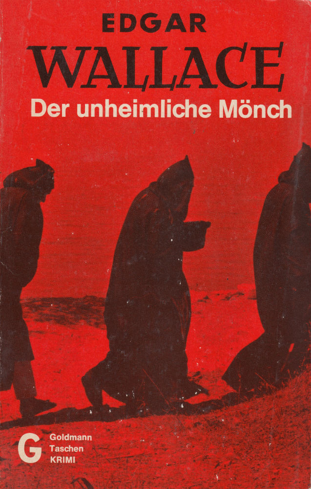 Edgar Wallace: Der unheimliche Mönch. Wilhelm Goldmann Verlag, München 1960. DNB